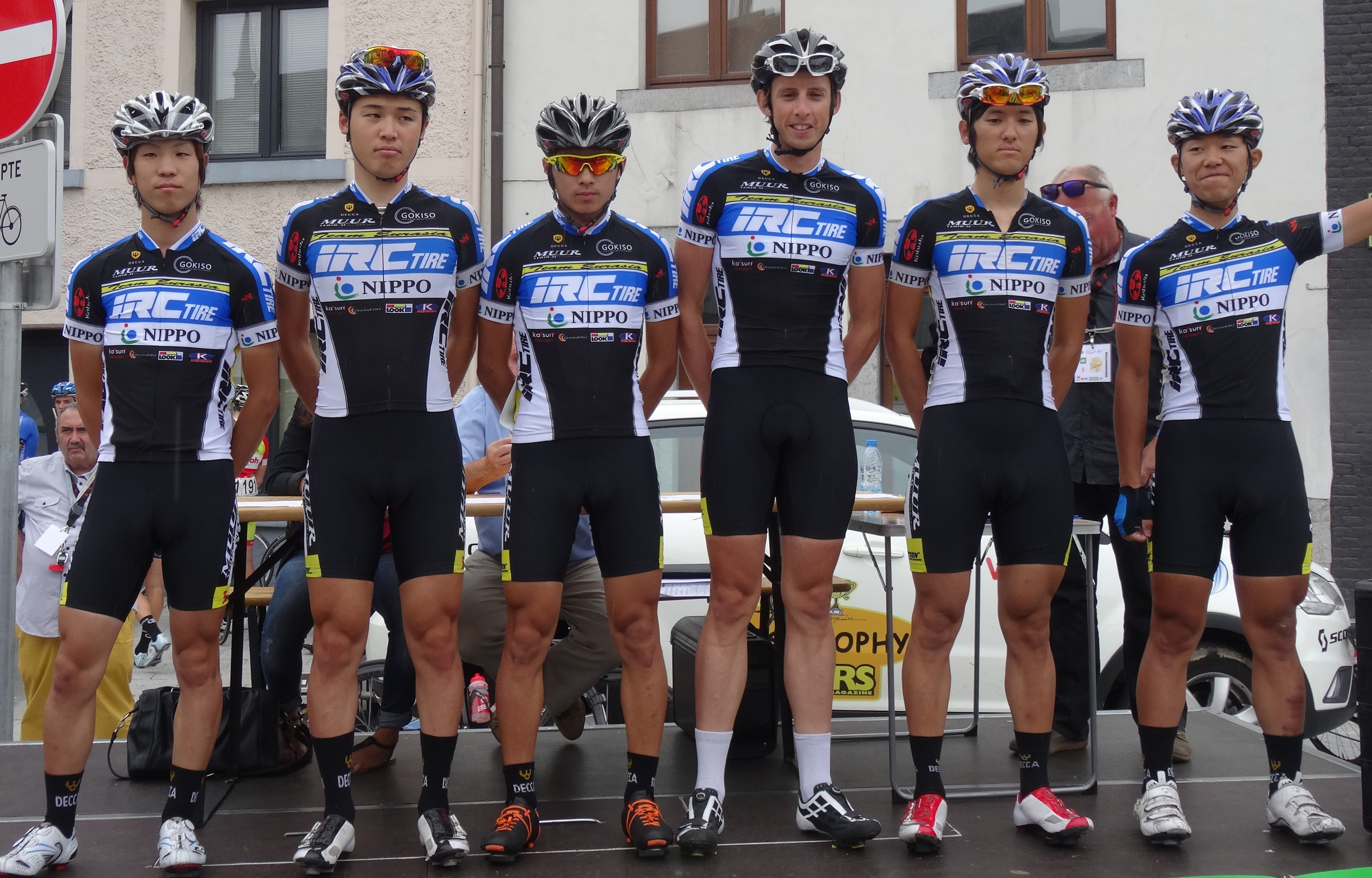 Reportage photographique réalisé le mercredi 6 août à l'occasion du départ de la première étape du Tour de la province de Namur 2014 à Jambes (Namur), Belgique.